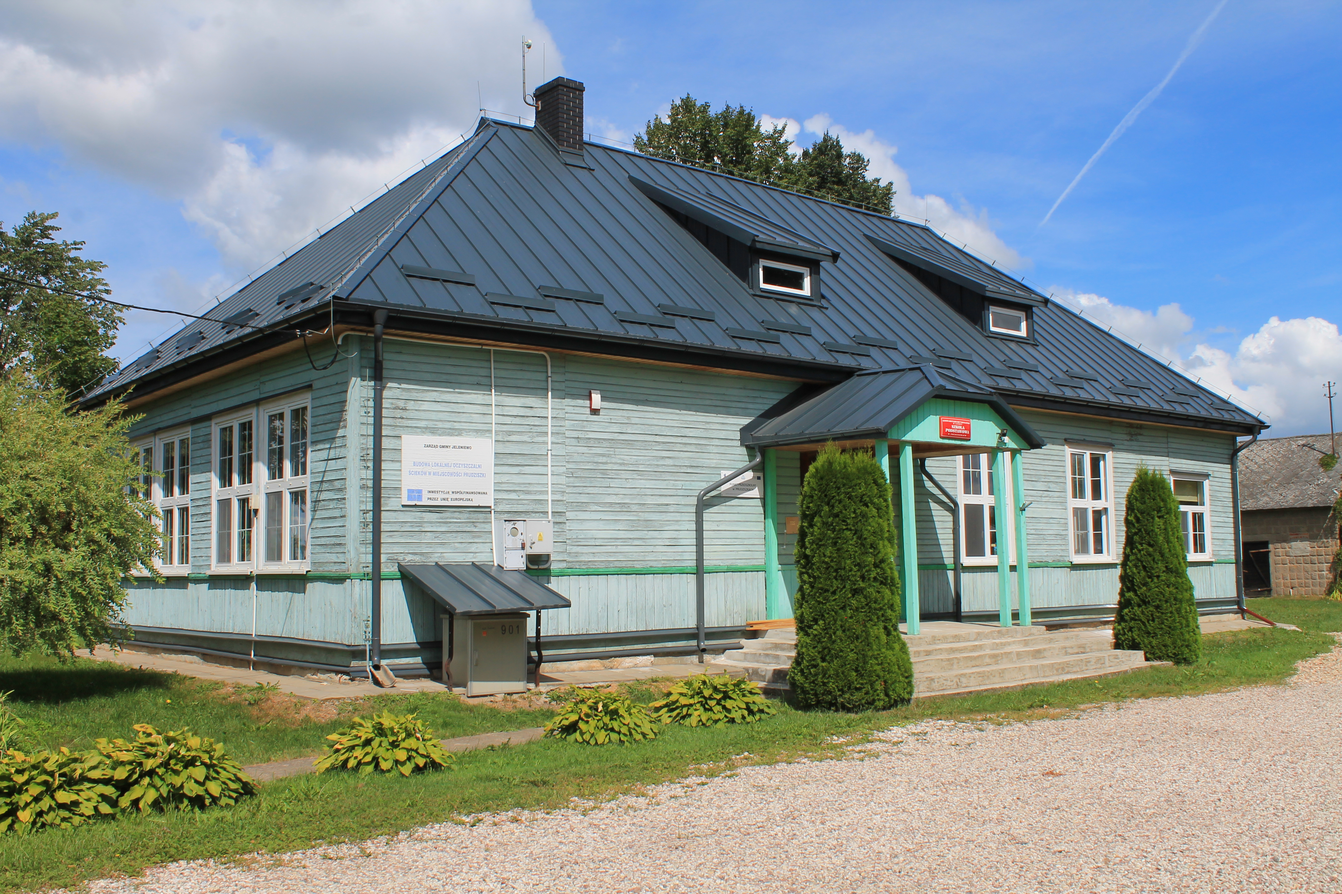 Szkoła podstawowa w Prudziszkach.